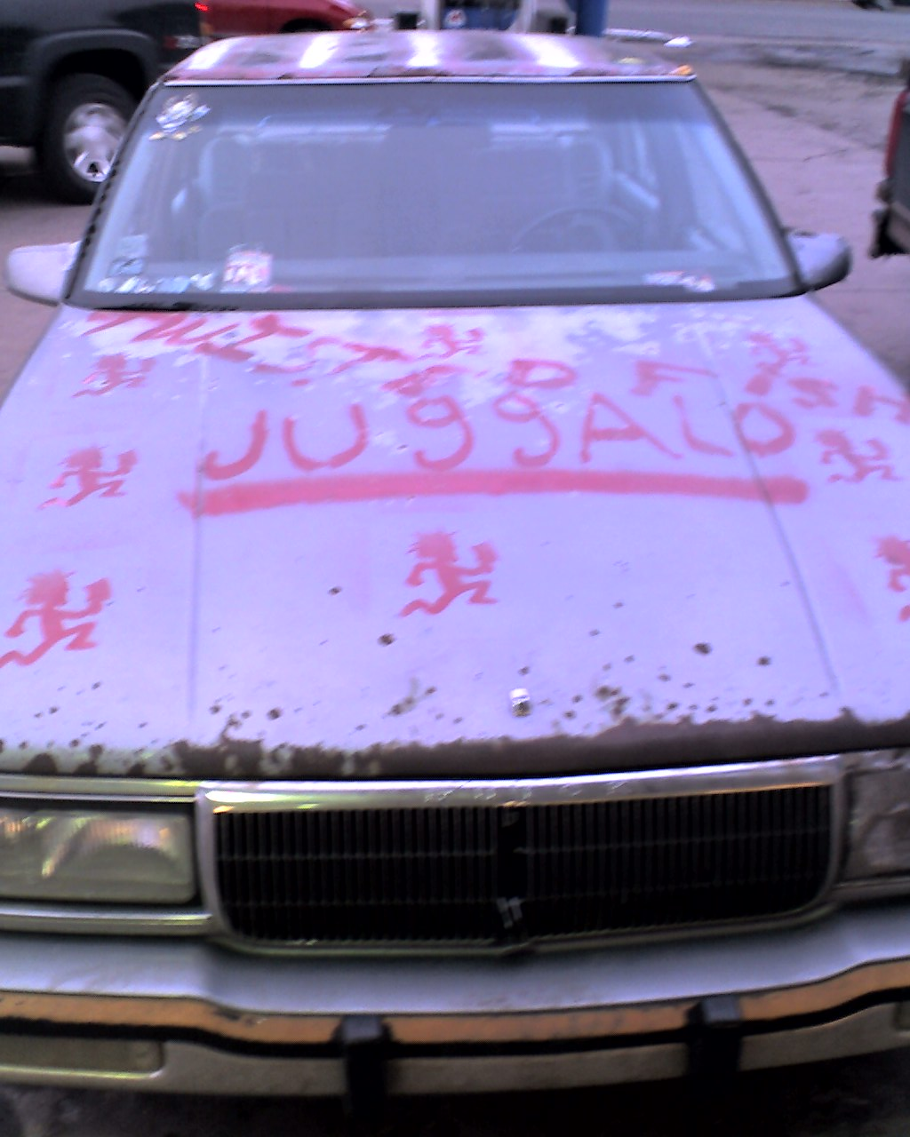 Juggalo Car